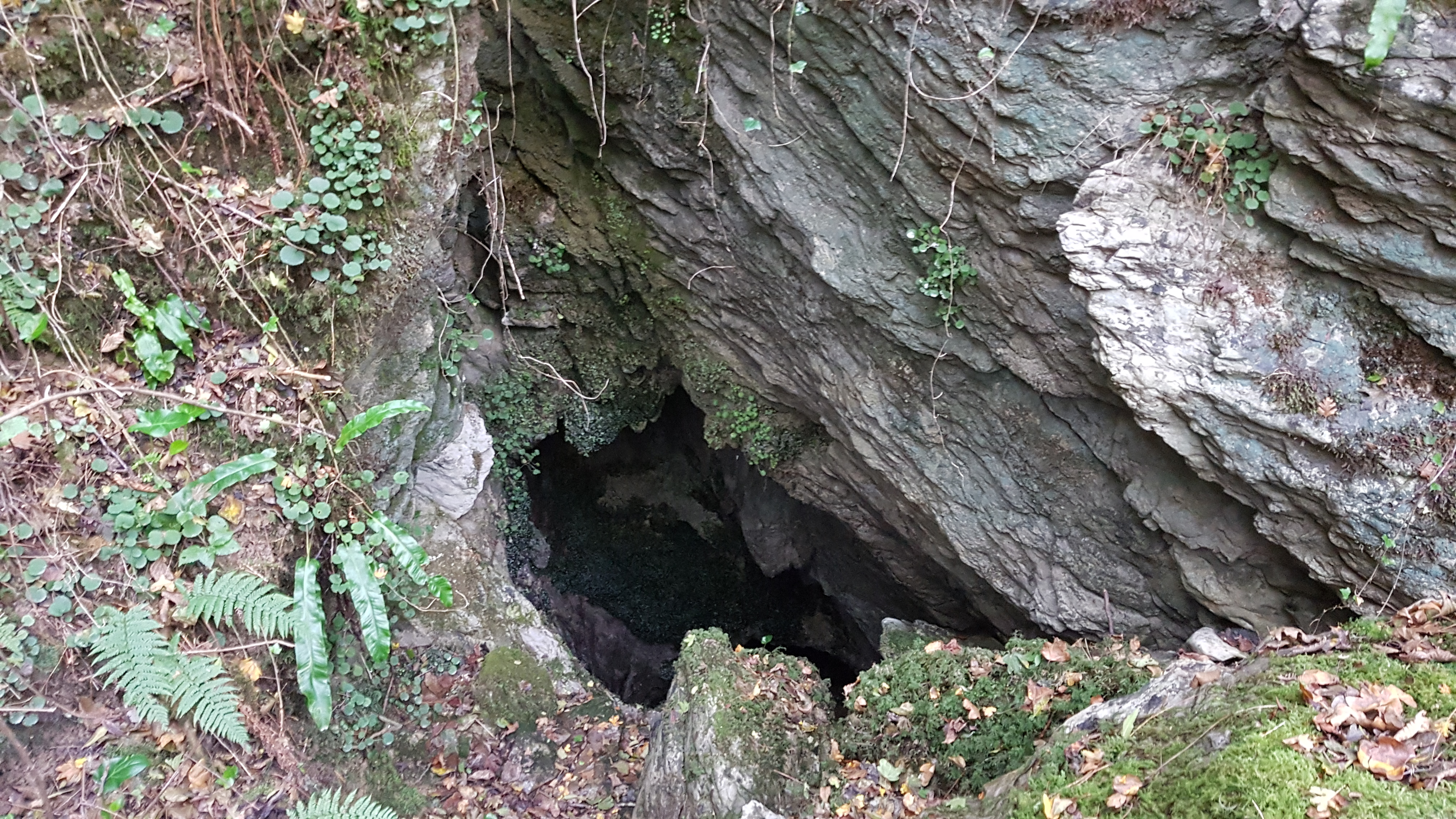 Andatza mendiko Emeretzuko leizea. Bertako ekosisteman hainbat espezie troglobio bizi dira, aipagarriena Speocharidius (Kobiella) galani espezie endemikoa, bertan bakarrik aurkitu da.